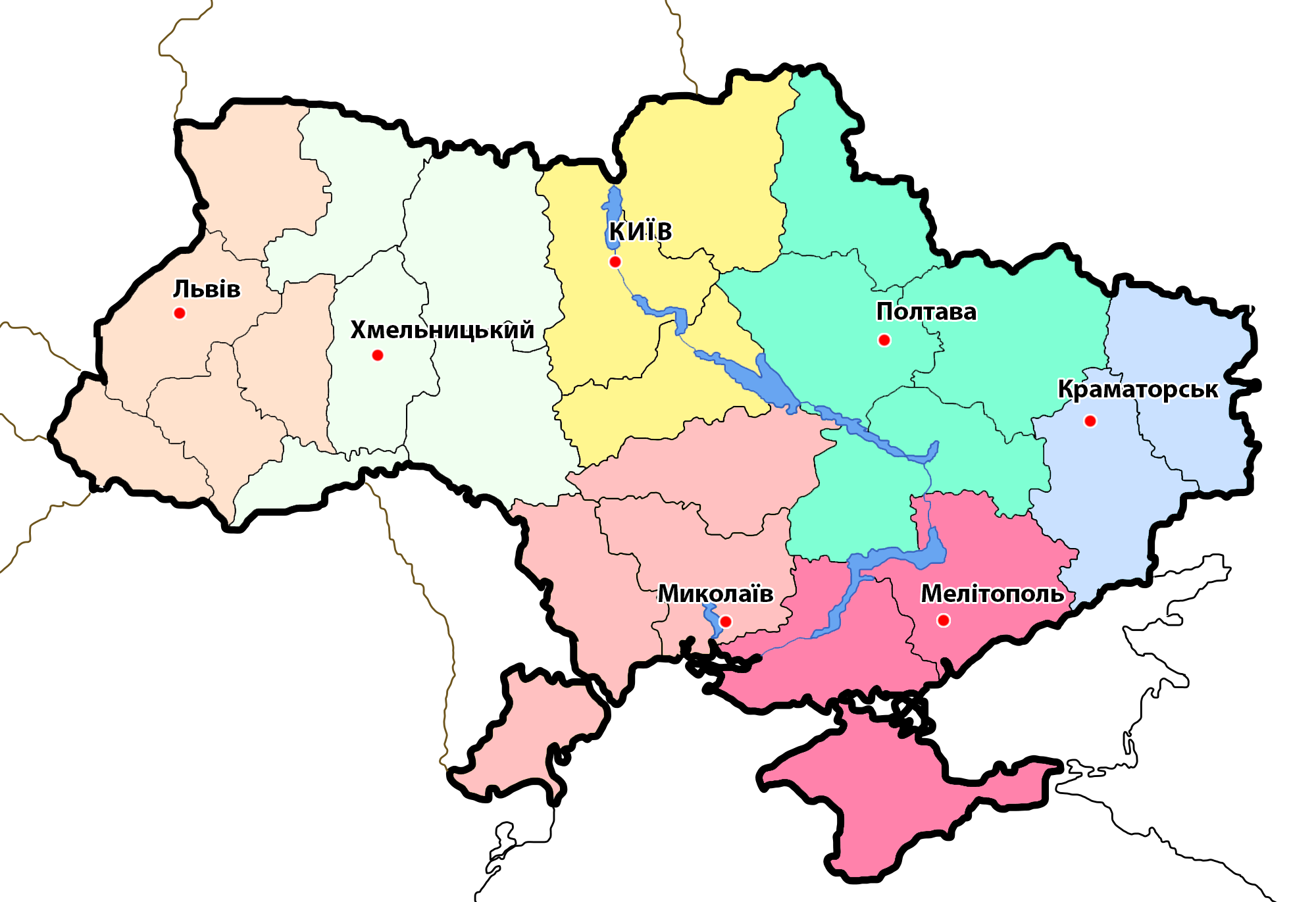 Національне антикорупційне бюро України. Територіальні відділення за першим проектом Закону про НАБУ